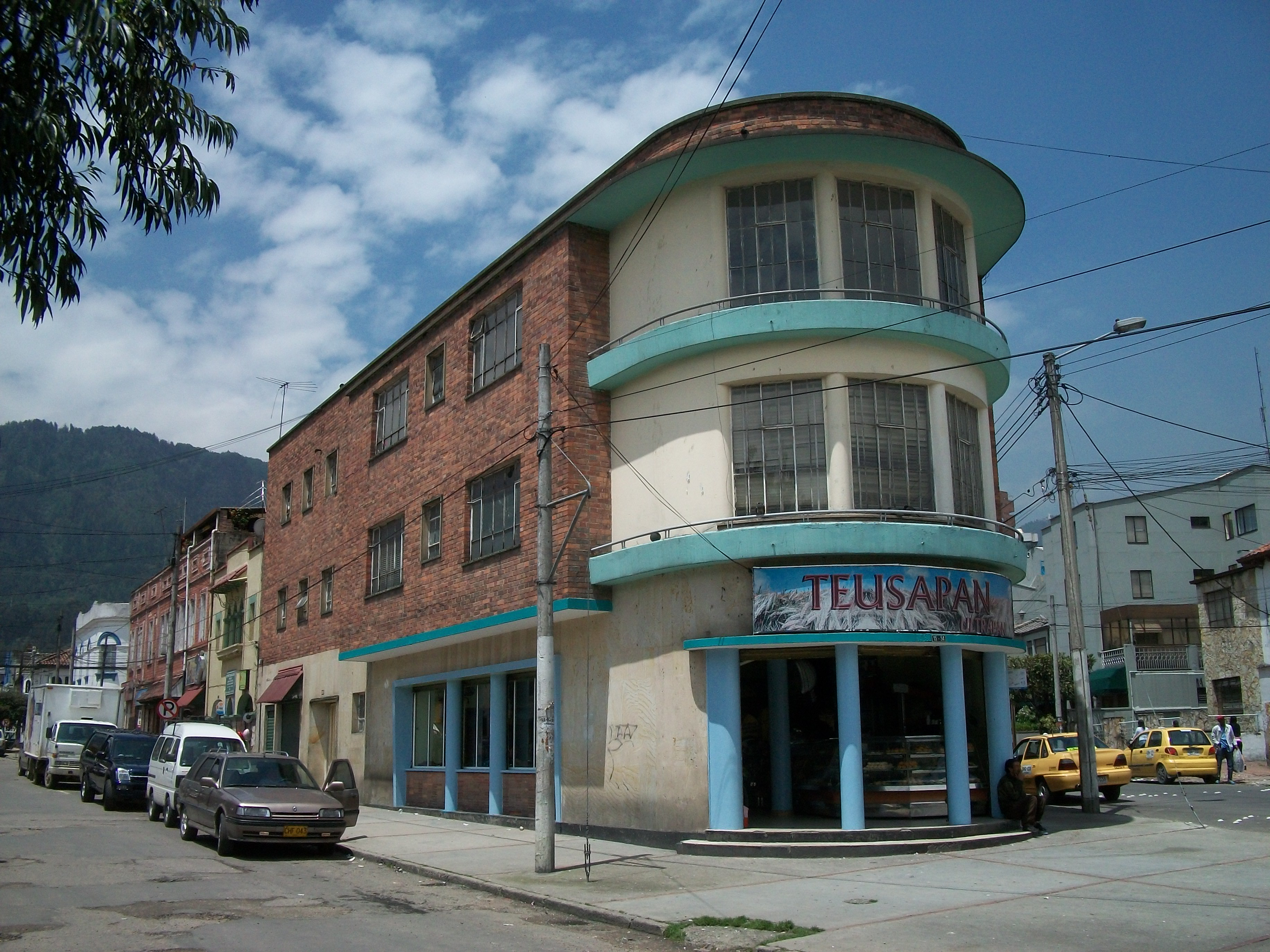 Edificio en el barrio y en la localidad de Teusaquillo, en la carrera 15, entre la diagonal 33Abis y la calle 33. Bogotá D. C.